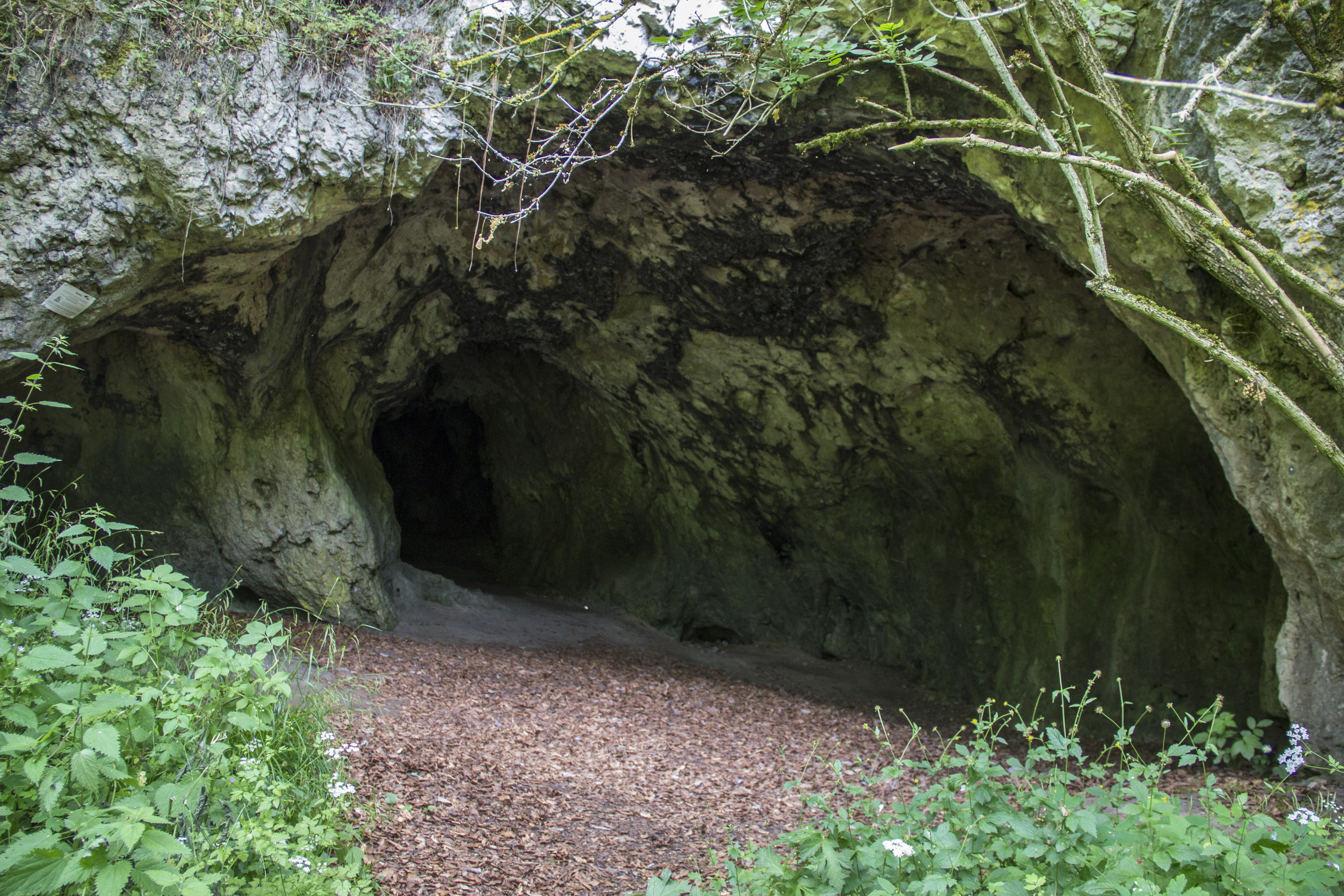 Karsthöhle, Großes Rohenloch, Velden, Geotop, Naturpark Fränkische Schweiz-Veldensteiner Forst